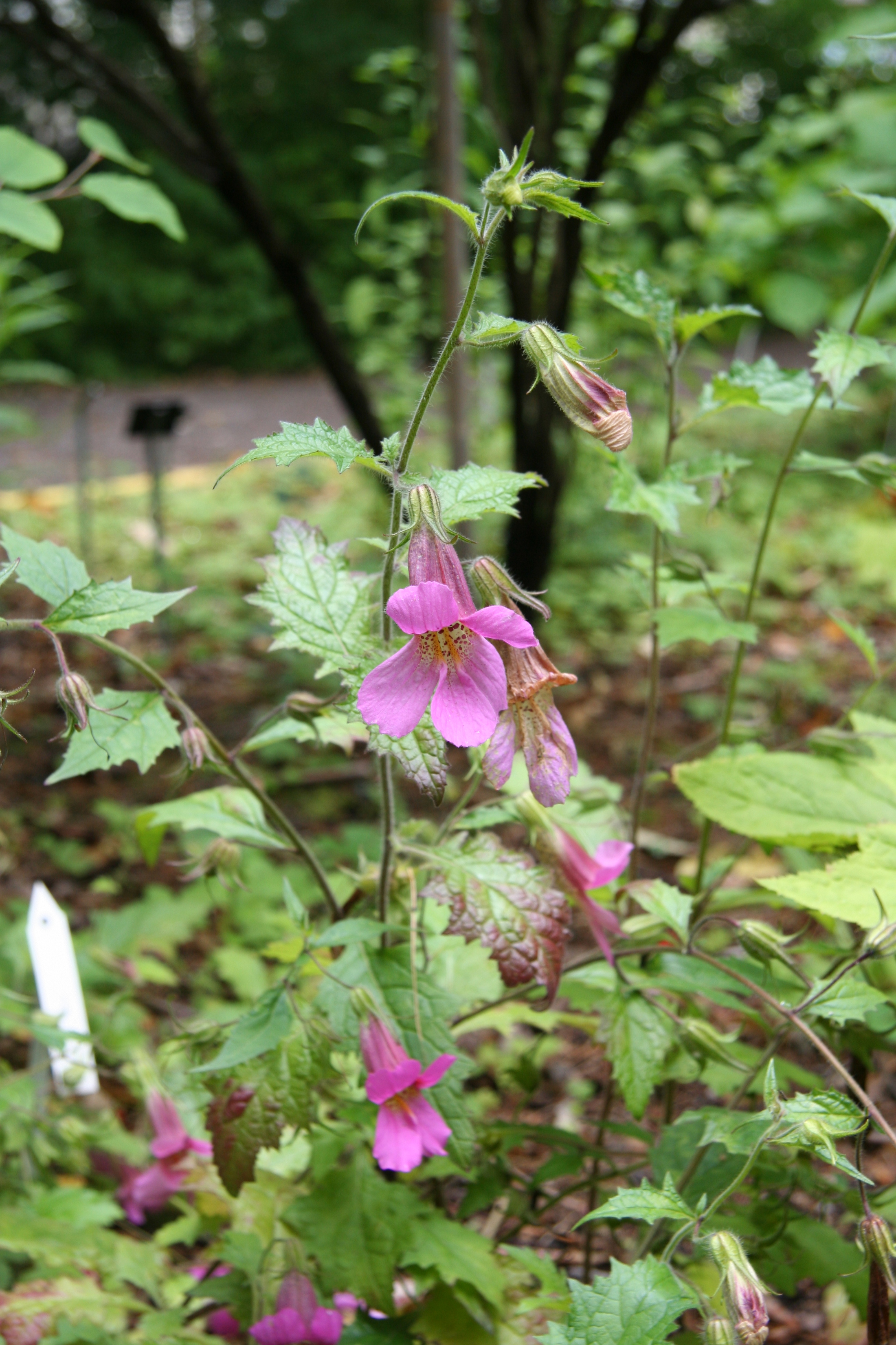 Rehmannia piasezkii im Botanischen Garten Dresden